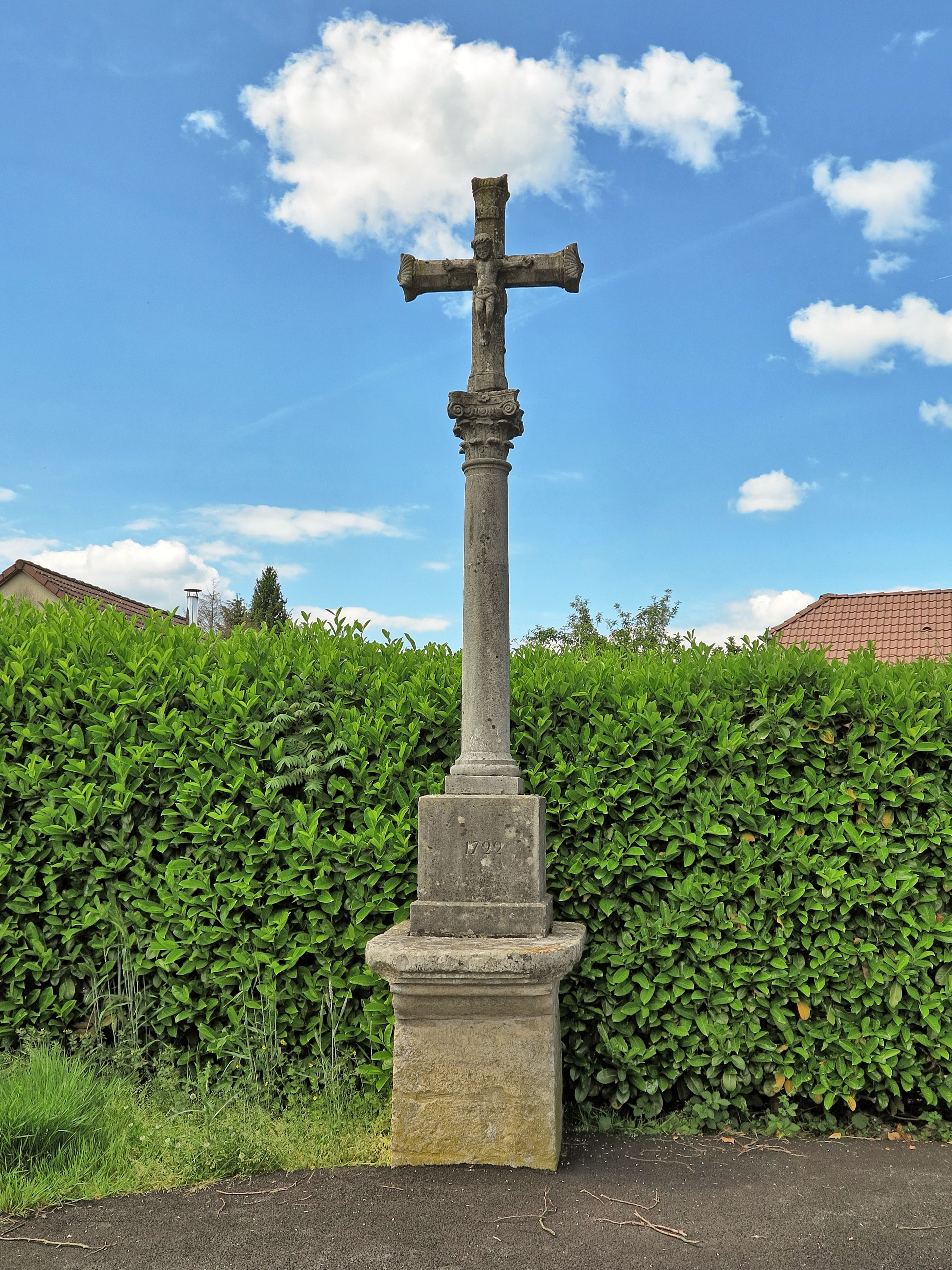 La croix de 1722